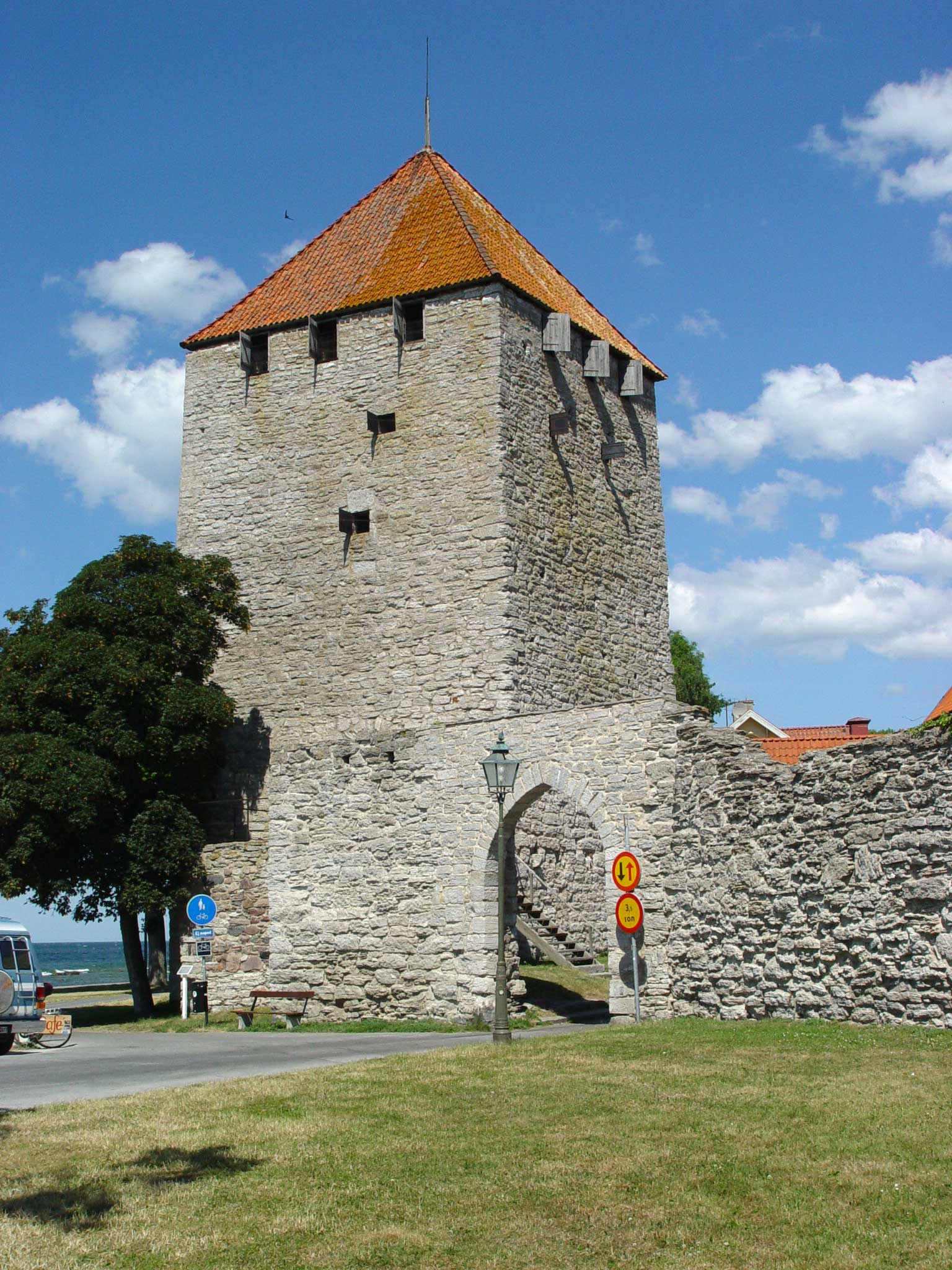 Der Pulverturm aus dem 12.Jahrhundert in der Stadtmauer von Visby (Gotland).